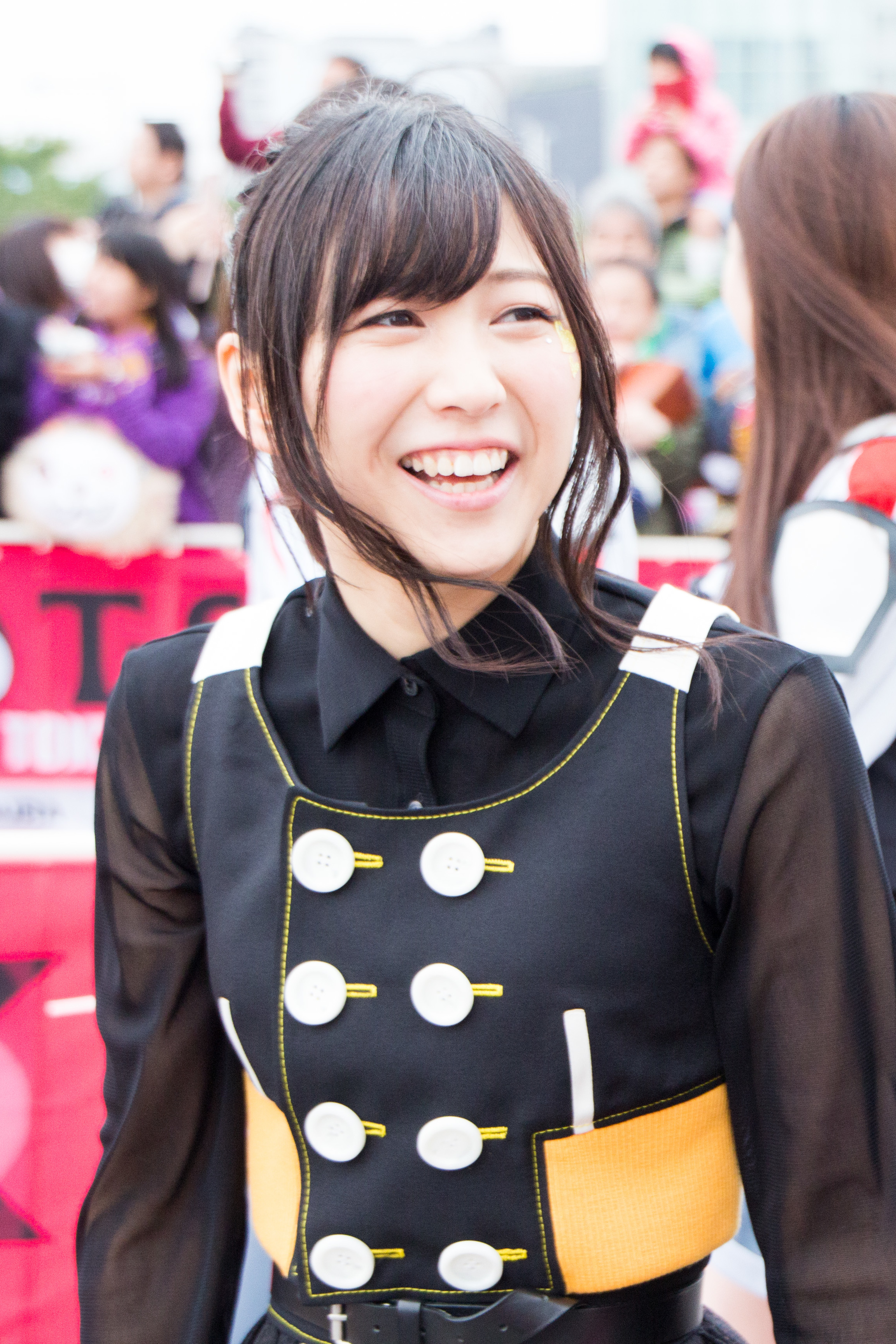 T-SPOOK 2016 安野希世乃 (ワルキューレ)